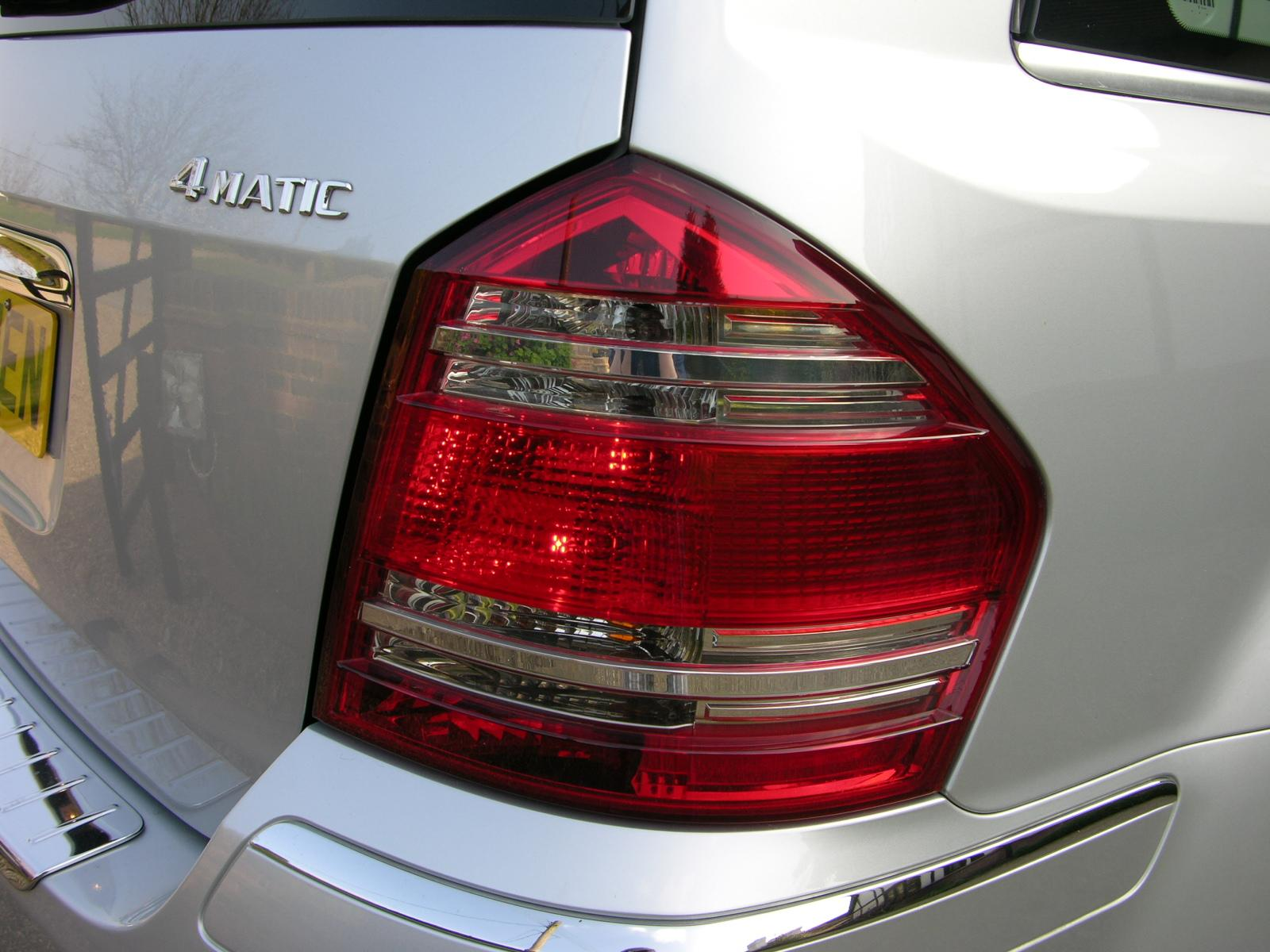 Mercedes Benz GL420 CDi 4-Matic